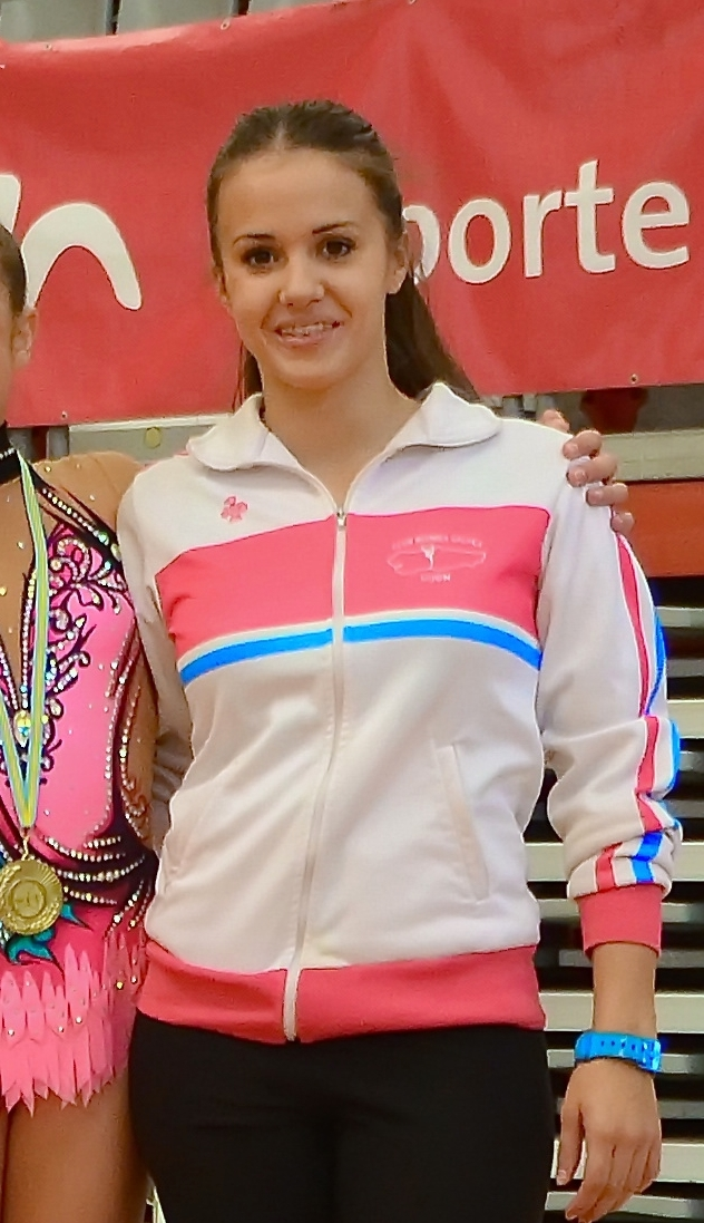 La ex gimnasta rítmica Raquel Rodríguez con el conjunto infantil federado del Club Rítmica Galaica en el podio del Campeonato de Asturias de 2014, celebrado en el Palacio de Deportes de Gijón el 11 de octubre de 2014.